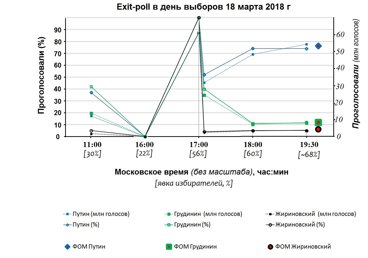 Иллюстрация результатов опросов в день голосования 18 марта 2018 г.